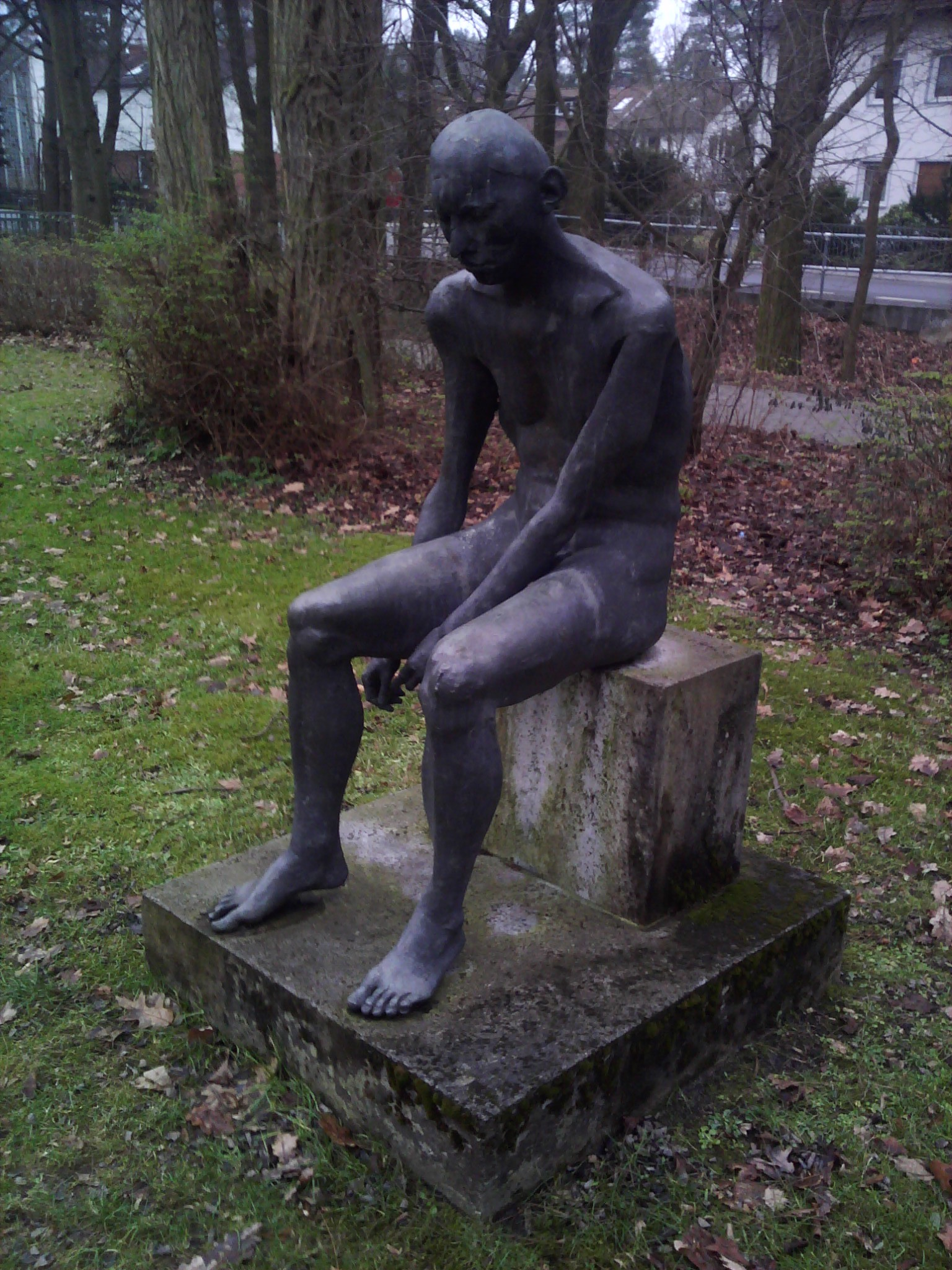 die Skulptur vor dem Neubau des Fridericianum in Erlangen